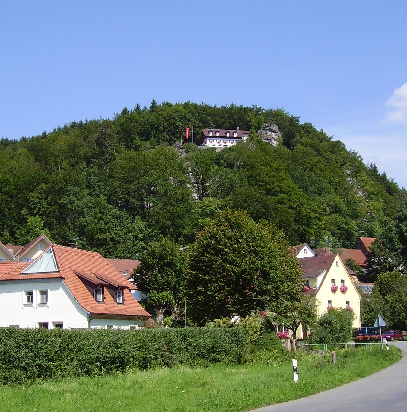 Veilbronn near Heiligenstadt in (Franconia)